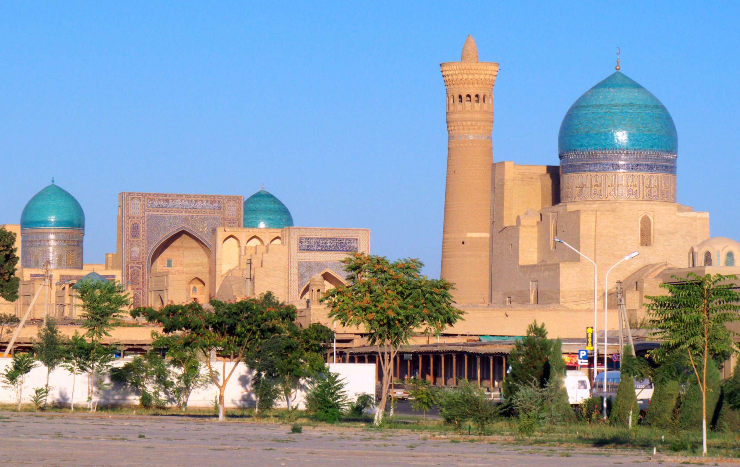 Poi Kalon Ensemble, Bukhara